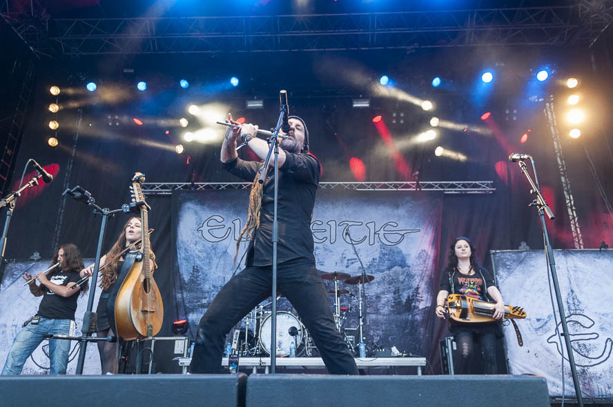 Band,Bostalsee,Eluveitie,Hexentanzfestival,Livekonzert,Livemusik,Musik,Open Air